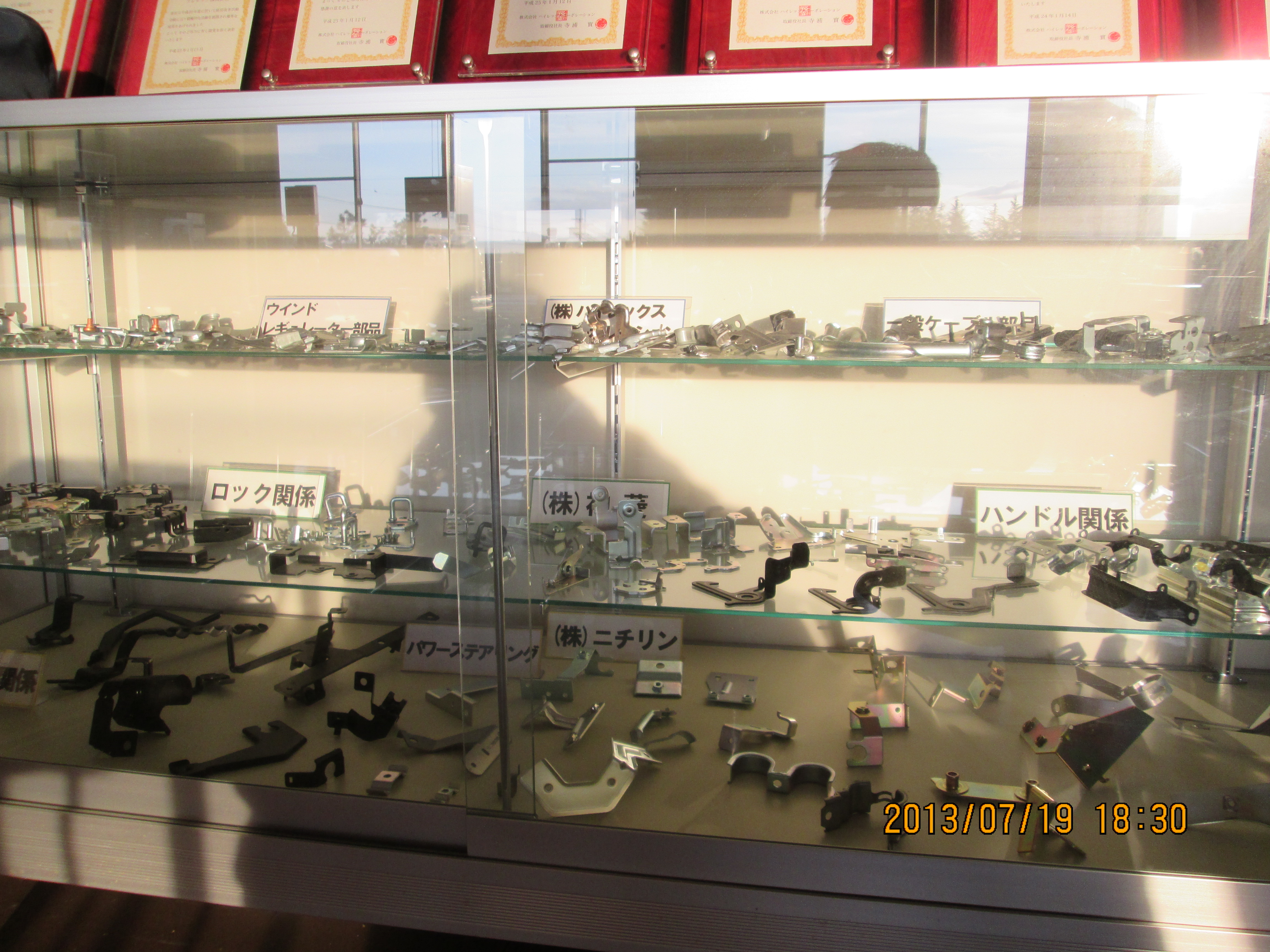 プレテック株式会社で生産されている部品